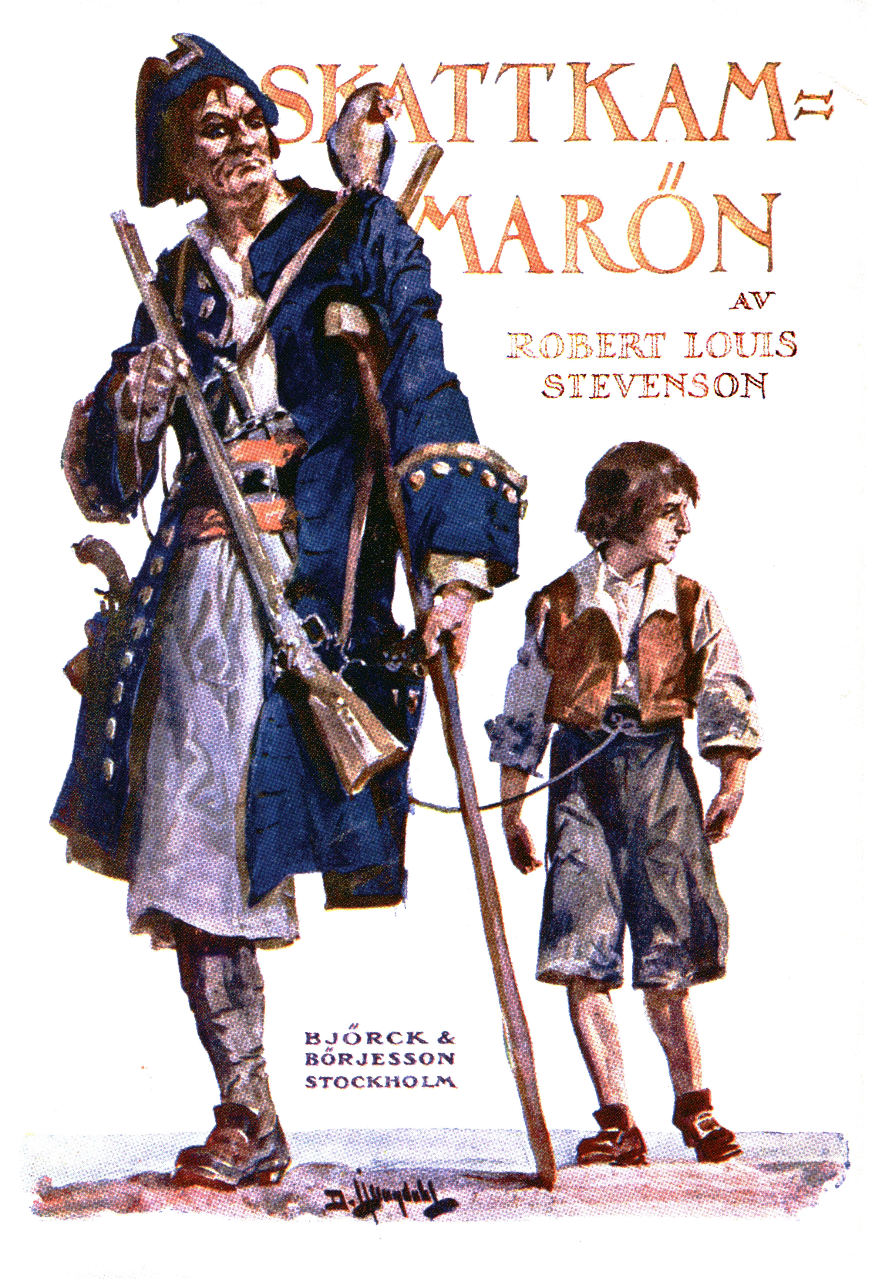 Book cover by David Ljungdahl (1870-1940): Skattkammarön